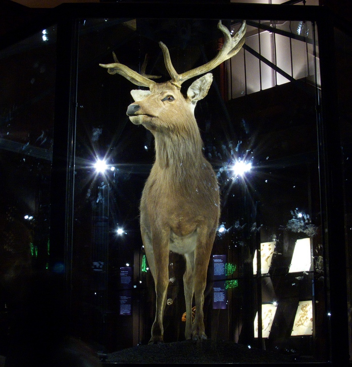 Cervus schomburgki, mâle